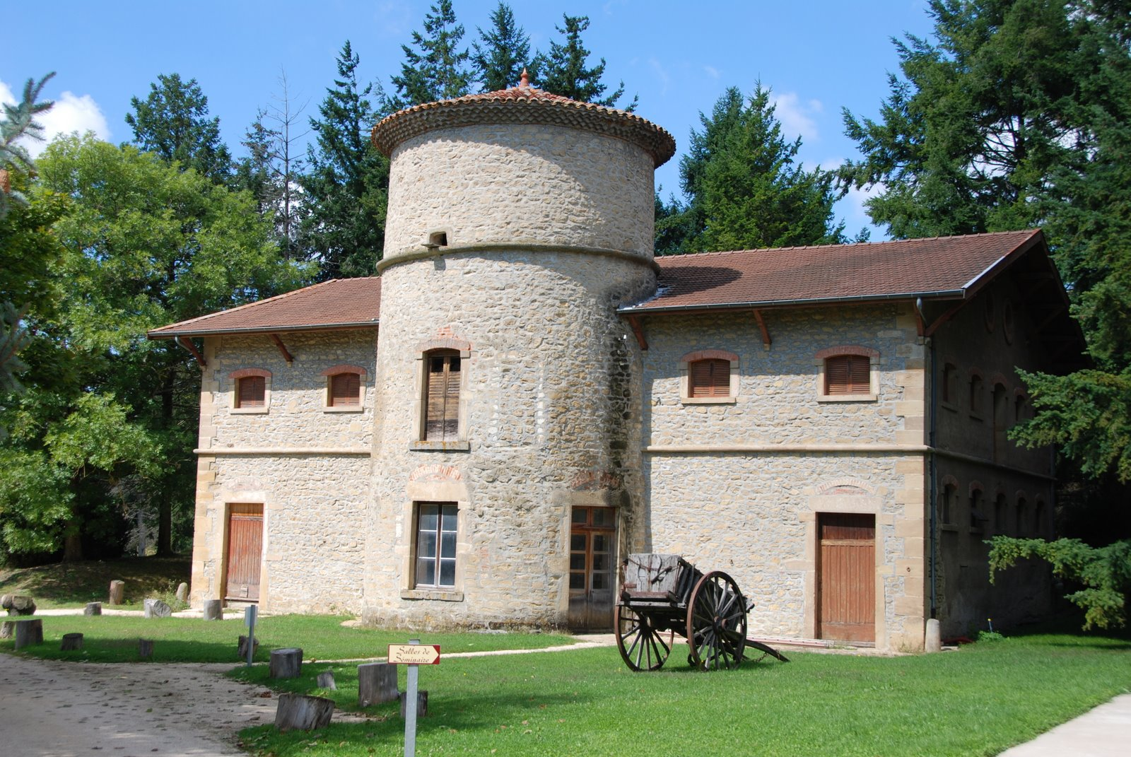 Le colombier vu de l'est.